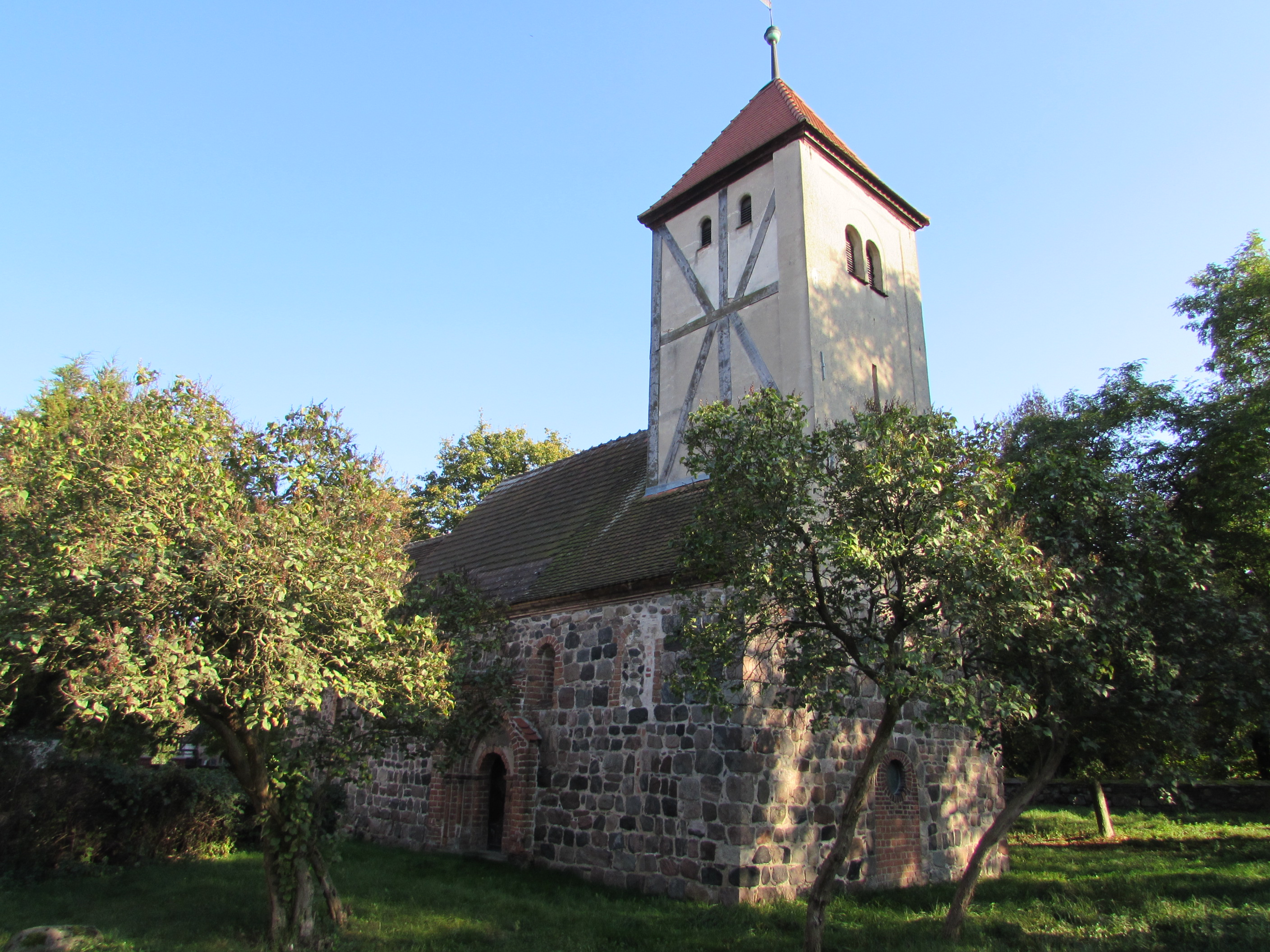 Rosenau in Brandenburg. Die Kirche im Ortsteil Warchau steht unter Denkmalschutz.